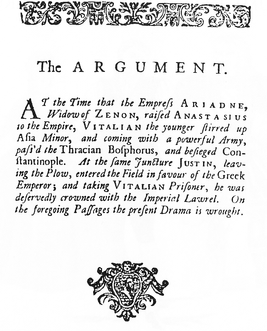 Vorrede in englischer Sprache zum Libretto der Oper Giustino, Thomas Wood, 1737